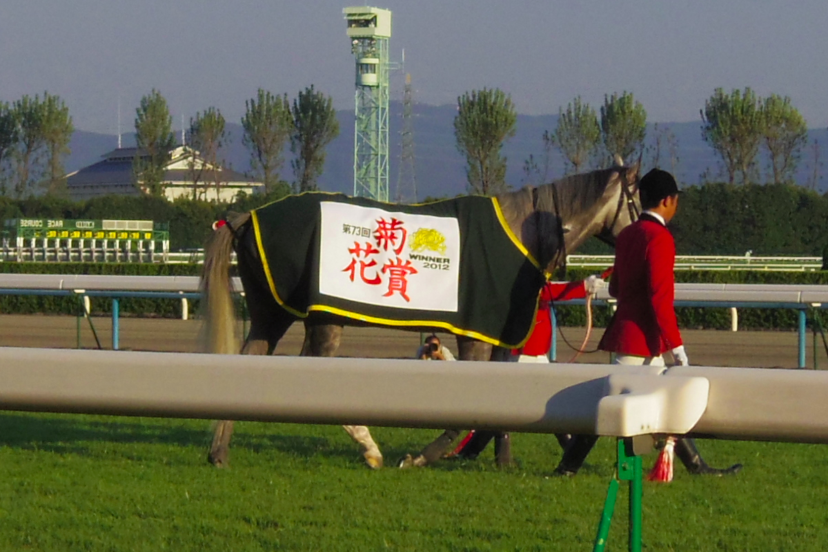 2012年菊花賞でのゴールドシップ